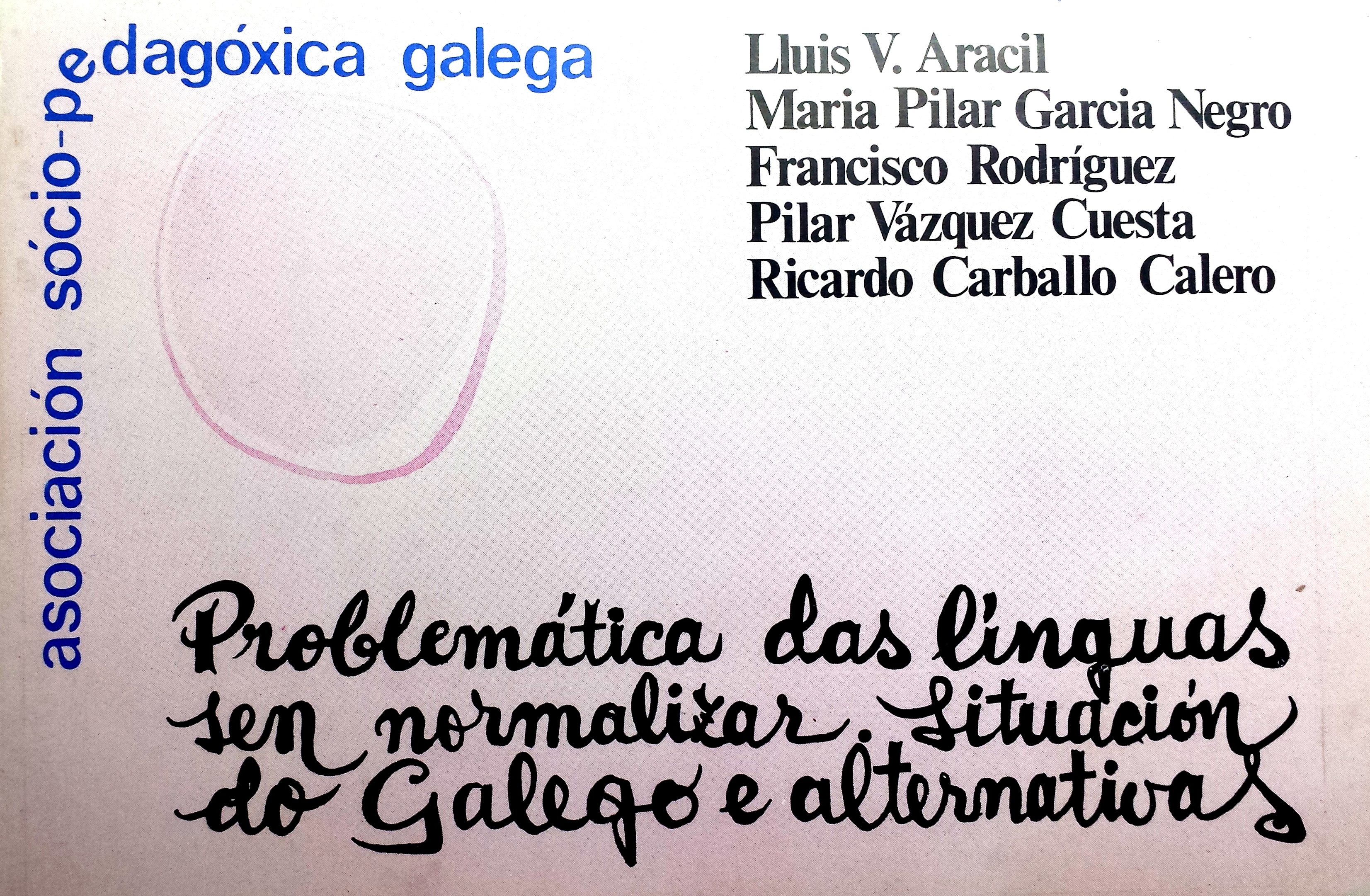 Problemática das línguas sen normalizar. Situación do galego e alternativas ISBN 84-85271-18-1. Depósito legal: OR. 31/1980